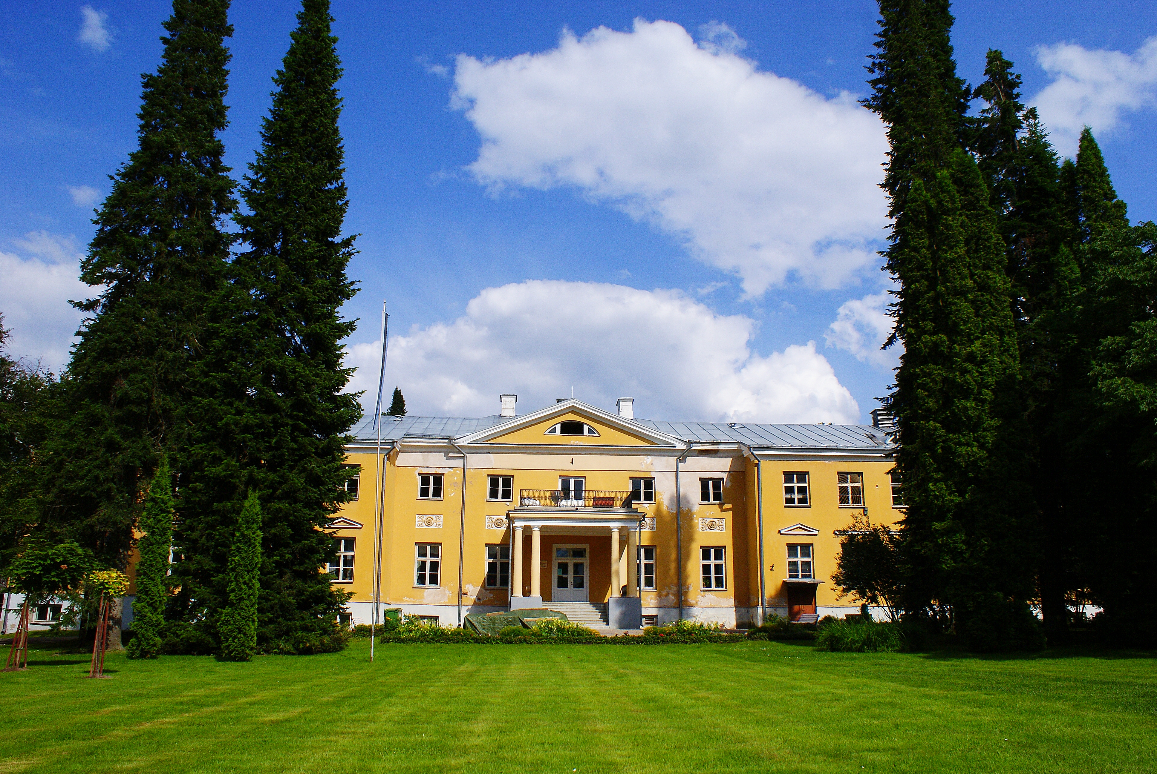 Räpina mõisa peahoone